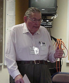 Bildo de Stevens Norvell dum li prelegis kadre de la Nord-Amerika Kursaro de Esperanto (NASK) en 2005 (?).